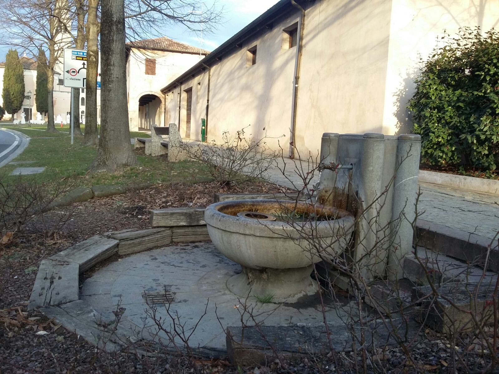 Cordovado: la fontanella del piazzale della Madonna.